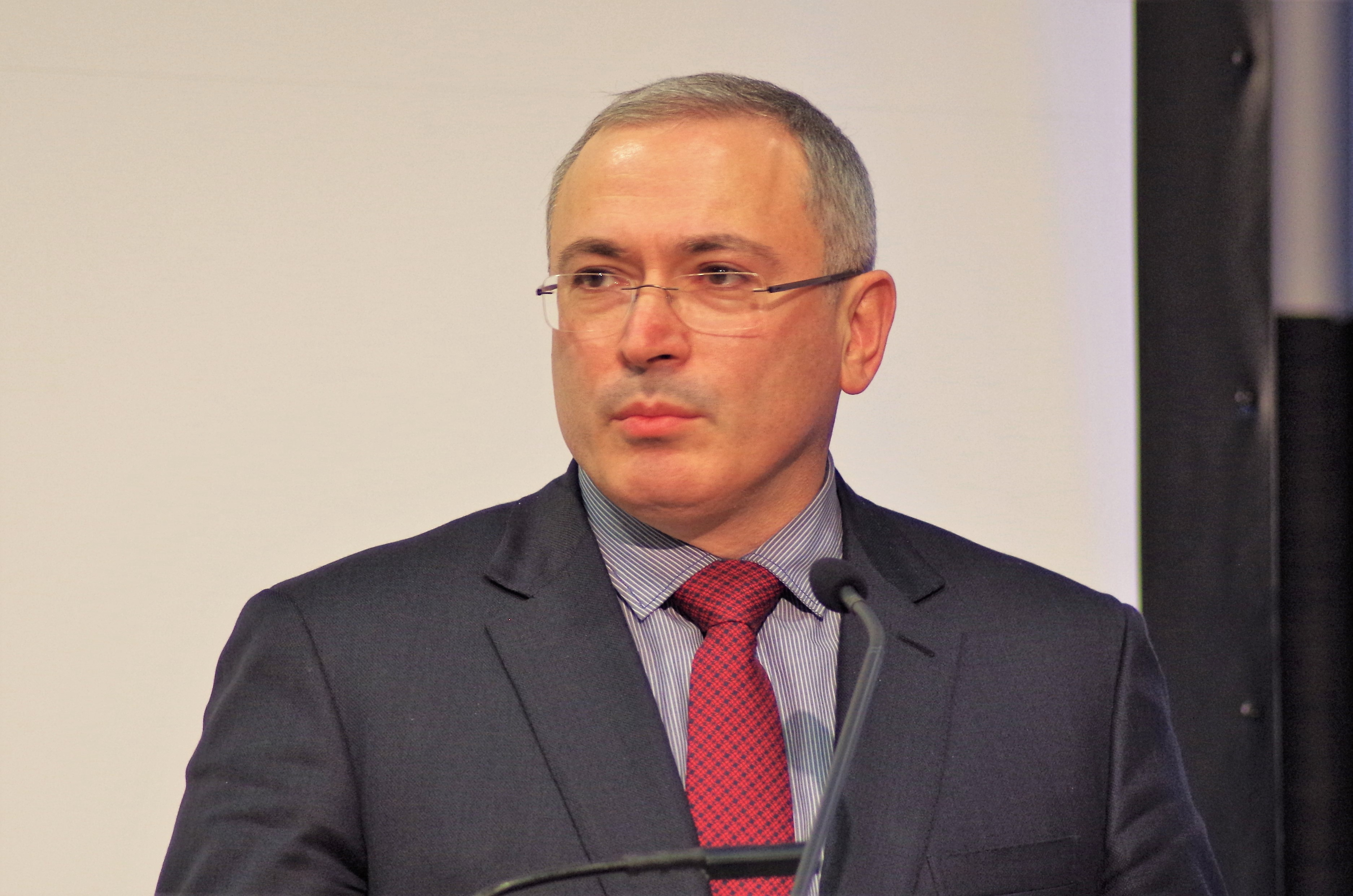 Mihhail Hodorkovski esinemas Tallinnas Inimõiguste aastakonverentsil 2016